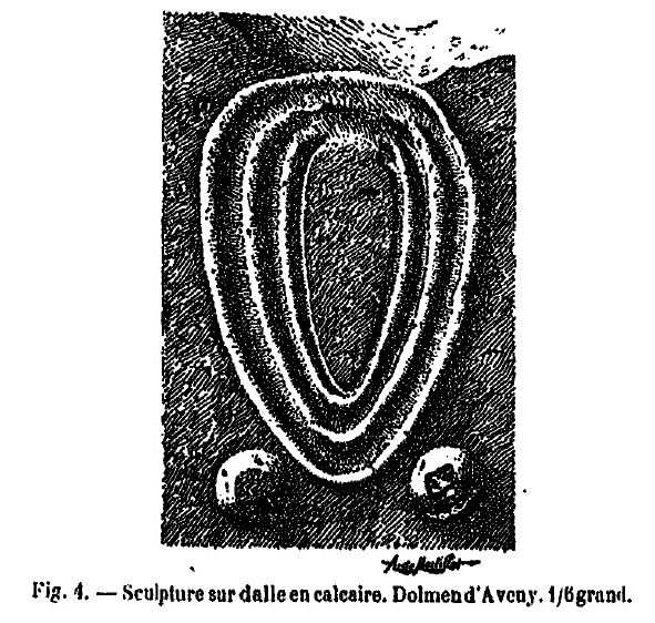 Gravure représentée sur l'un des supports de l'allée couverte de Dampsmesnil dessinée par Adrien de Mortillet